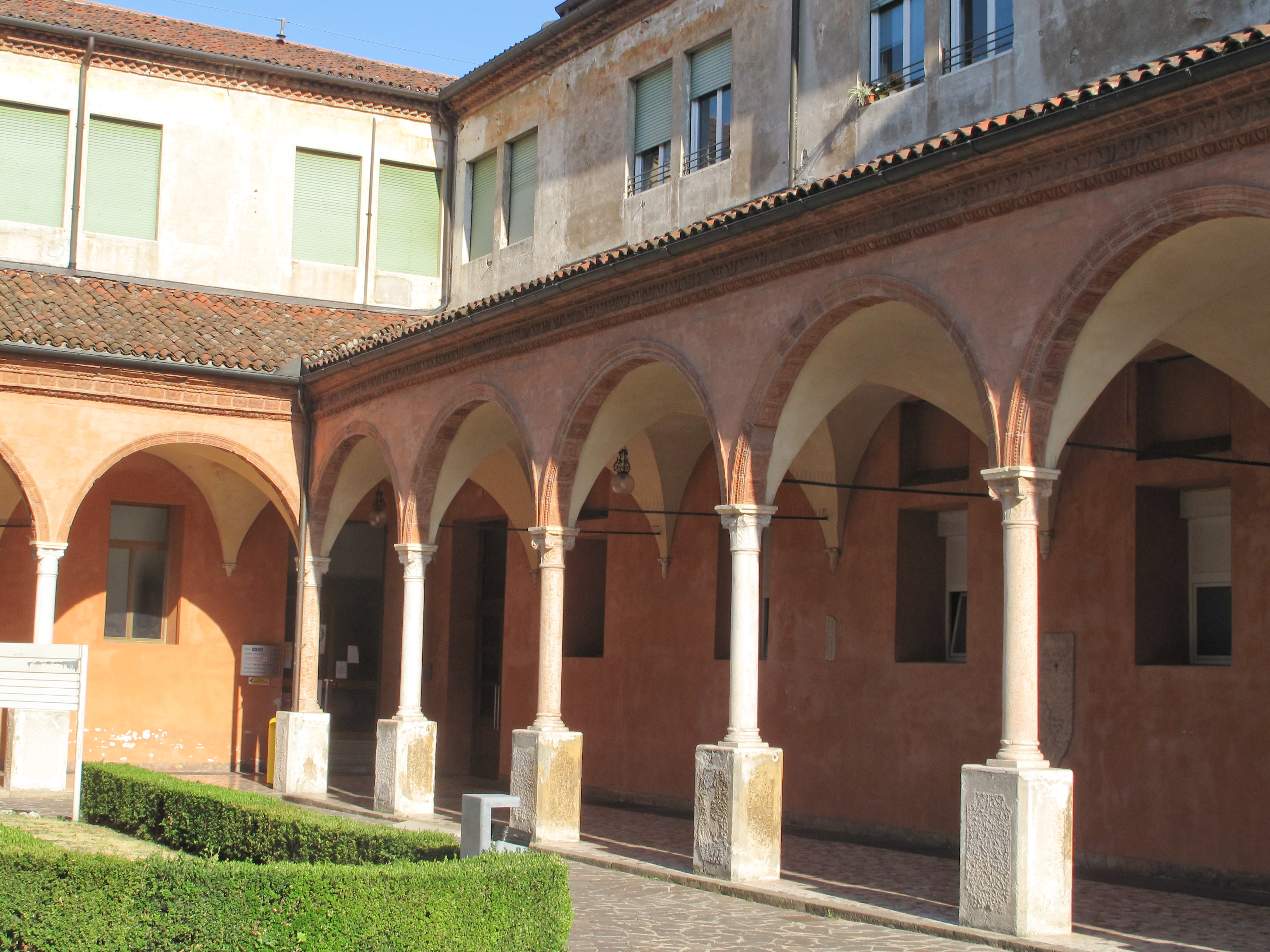 Vicenza - Monastero di San Bartolomeo - Chiostro